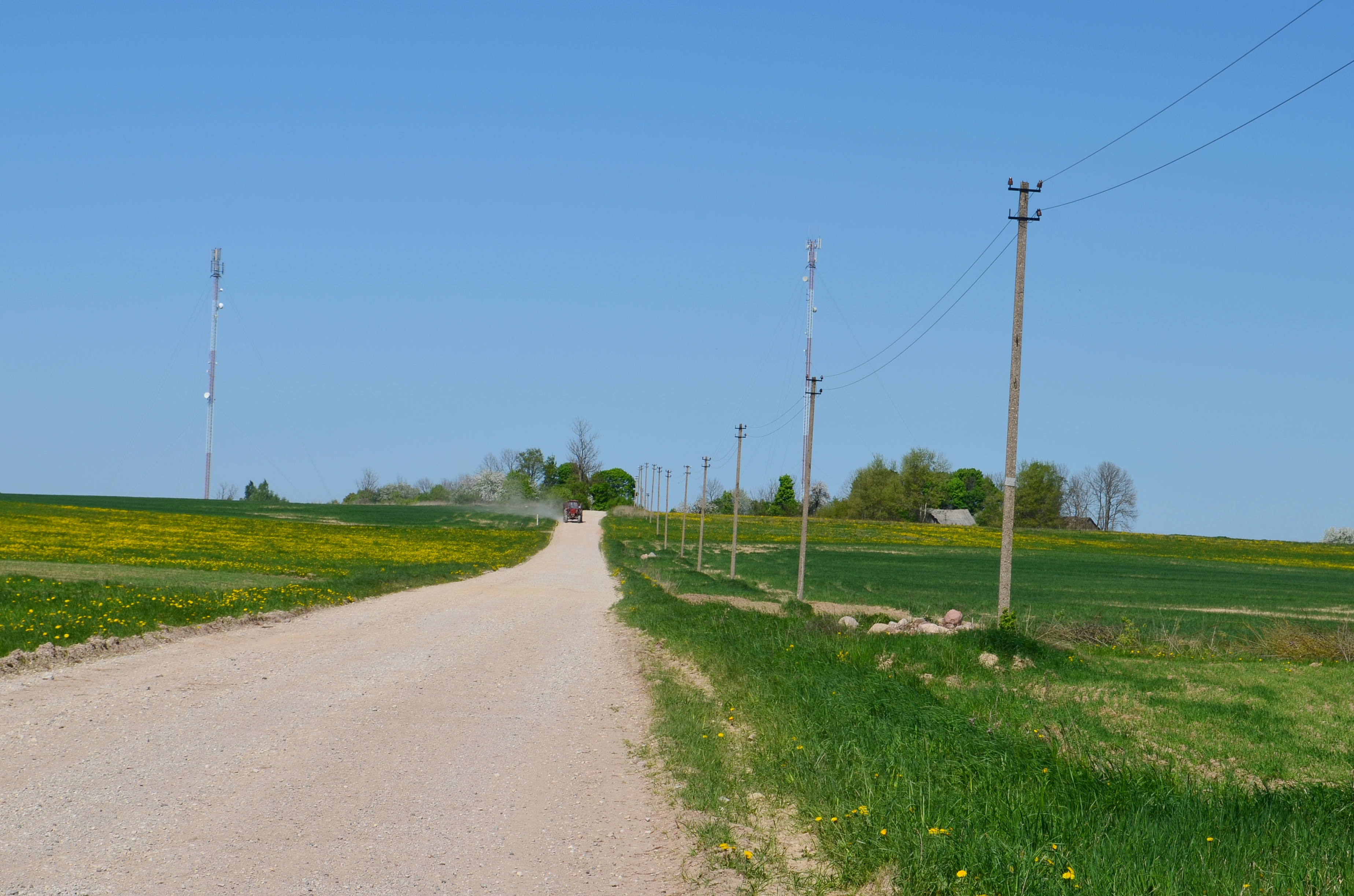 Dejūnai, Kurklių sen., Anykščių raj.